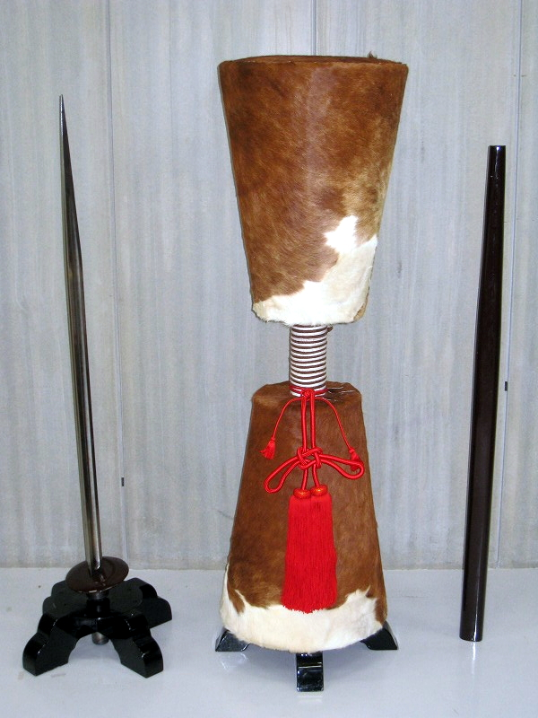 「御手杵」の槍の、取り外した穂先と鞘。結城市当局の特別の撮影許可を受け、結城市立図書館にて。